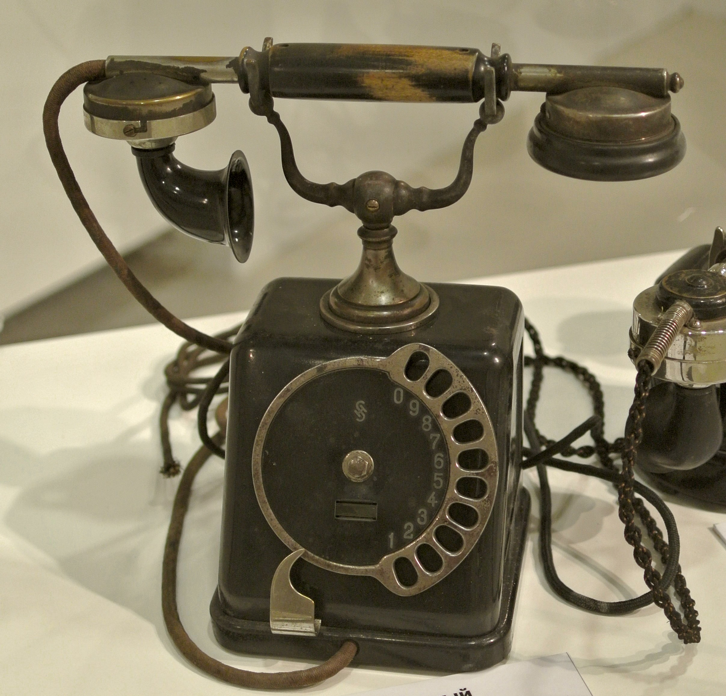 Настольный телефон Siemens & Halske с номеронабирателем, 1910 год